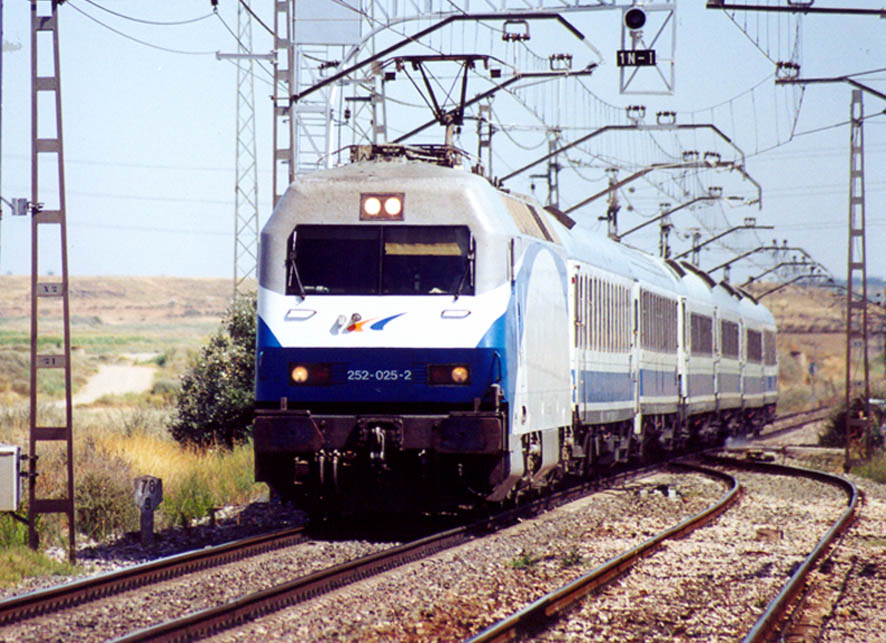 Estación de Grañén: La locomotora 252.025 de Renfe Operadora con el Diurno "Miguel de Unamuno" Barcelona - Bilbao / Irún / Salamanca.